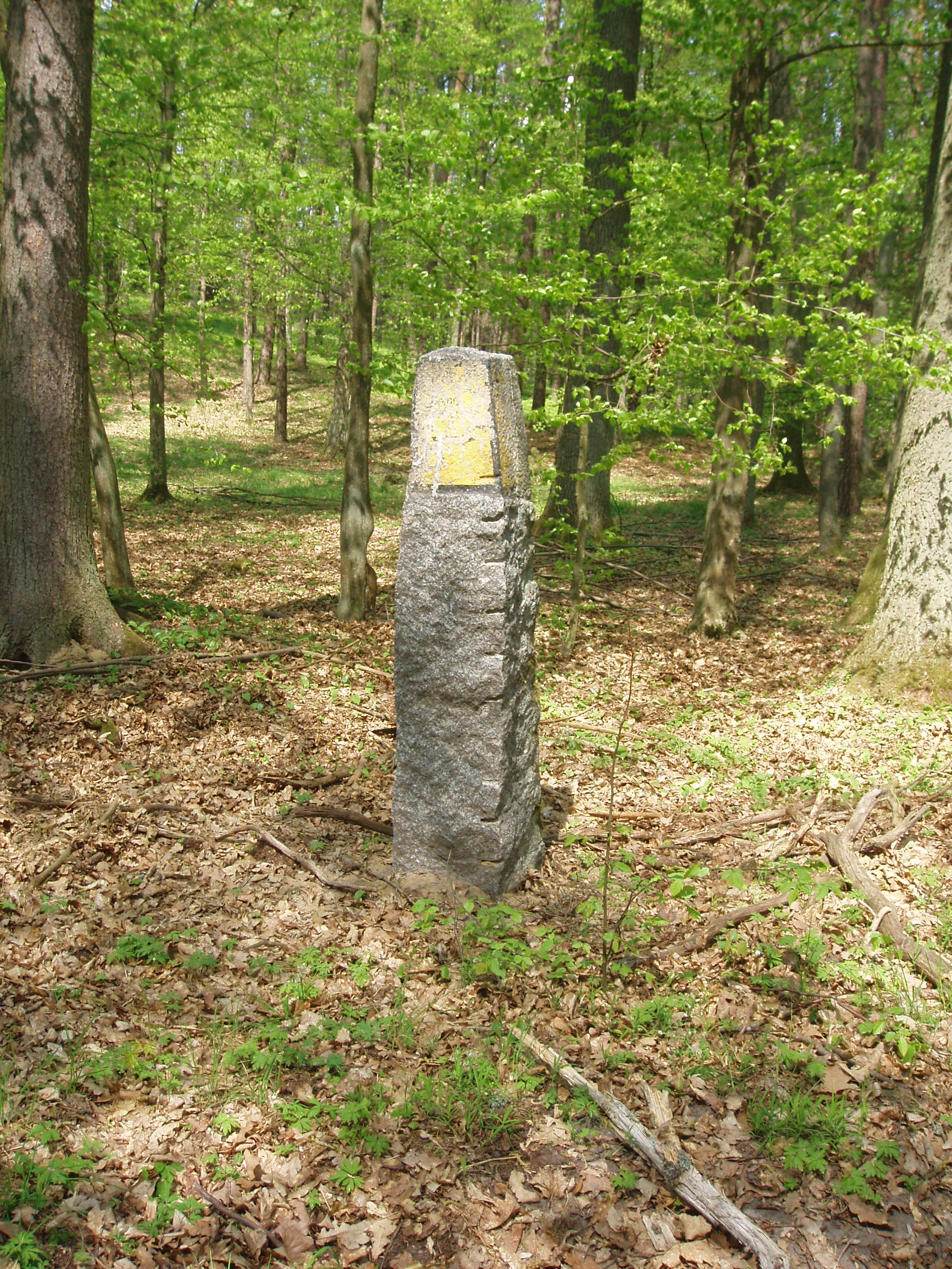 Jełguń, Las Warmiński, słup drogowskazowy